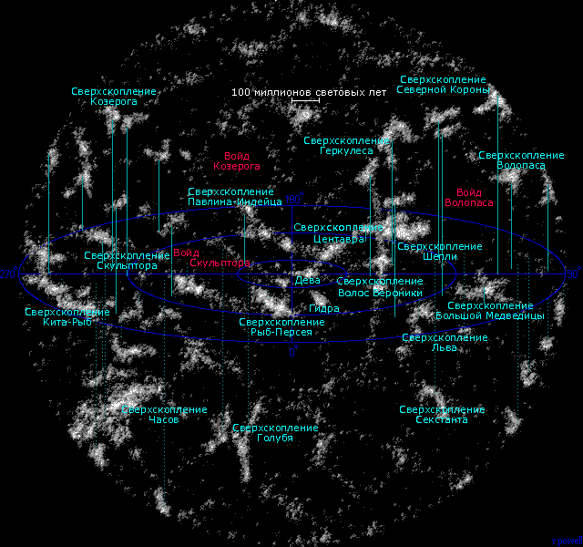 Вселенная в пределах одного миллиарда световых лет от Земли. Показаны местные сверхскопления и войды, примерно 63 миллиона галактик.